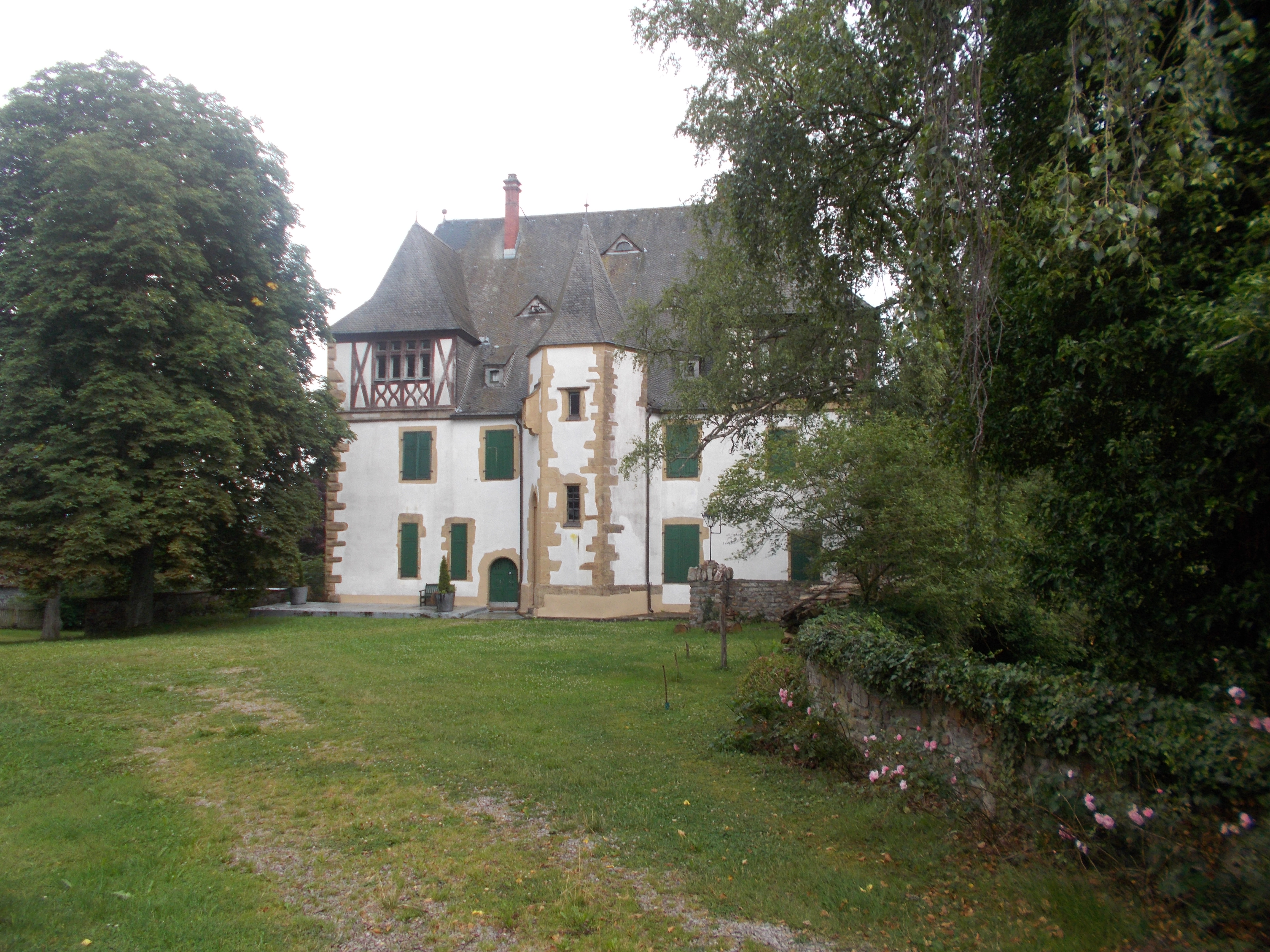 zwei- und dreigeschossiger Walmdachbau, im Kern spätmittelalterlich, mehrfach verändert, vor allem 1511 und von 1898 bis 1900, Architekten Wilhelm Müller und Franz Rummel, Frankfurt; ortsbildprägend